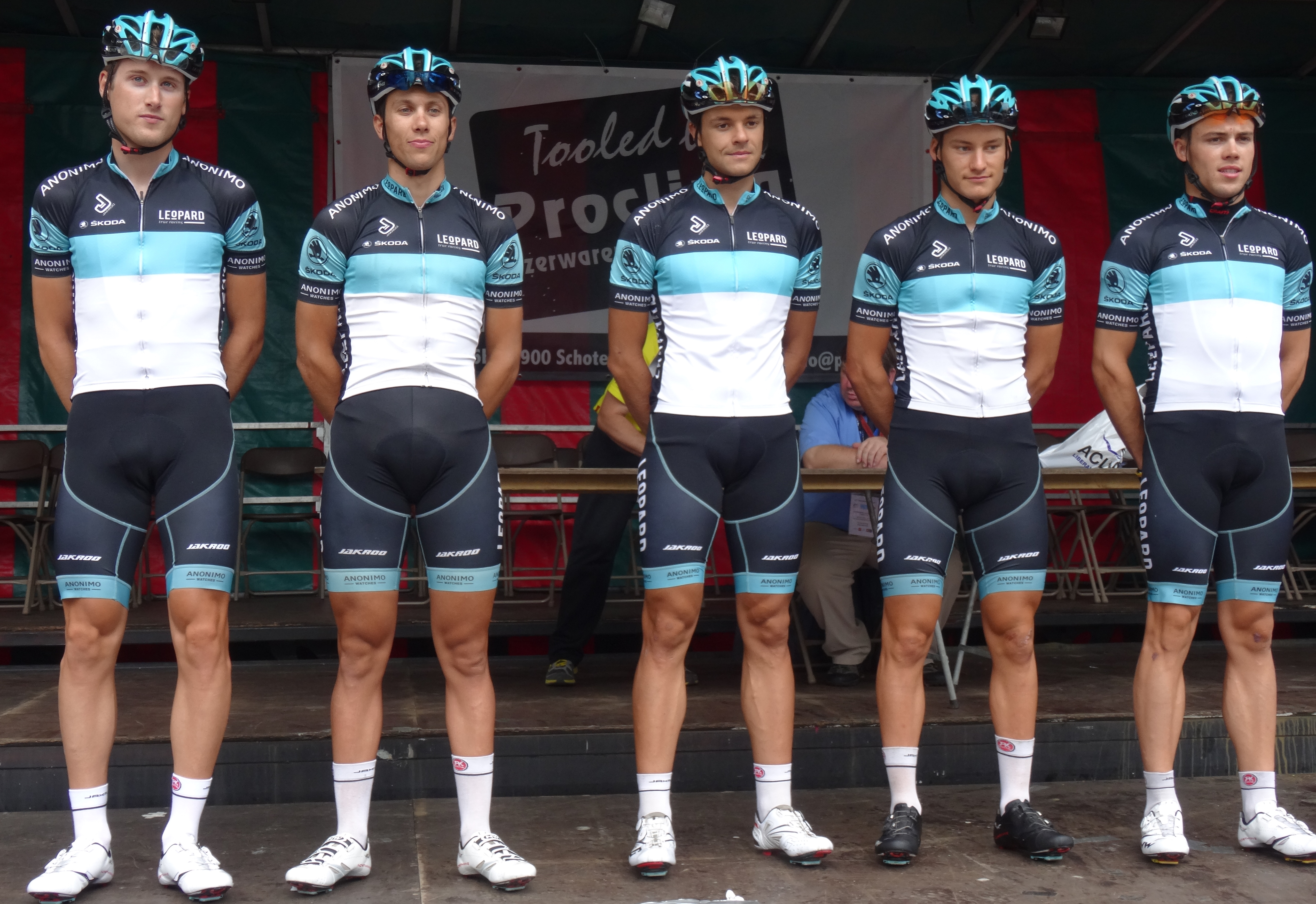 Reportage photographique réalisé le dimanche 10 août à l'occasion du départ et de l'arrivée de la Flèche du port d'Anvers 2014 à Merksem (Anvers), Belgique.